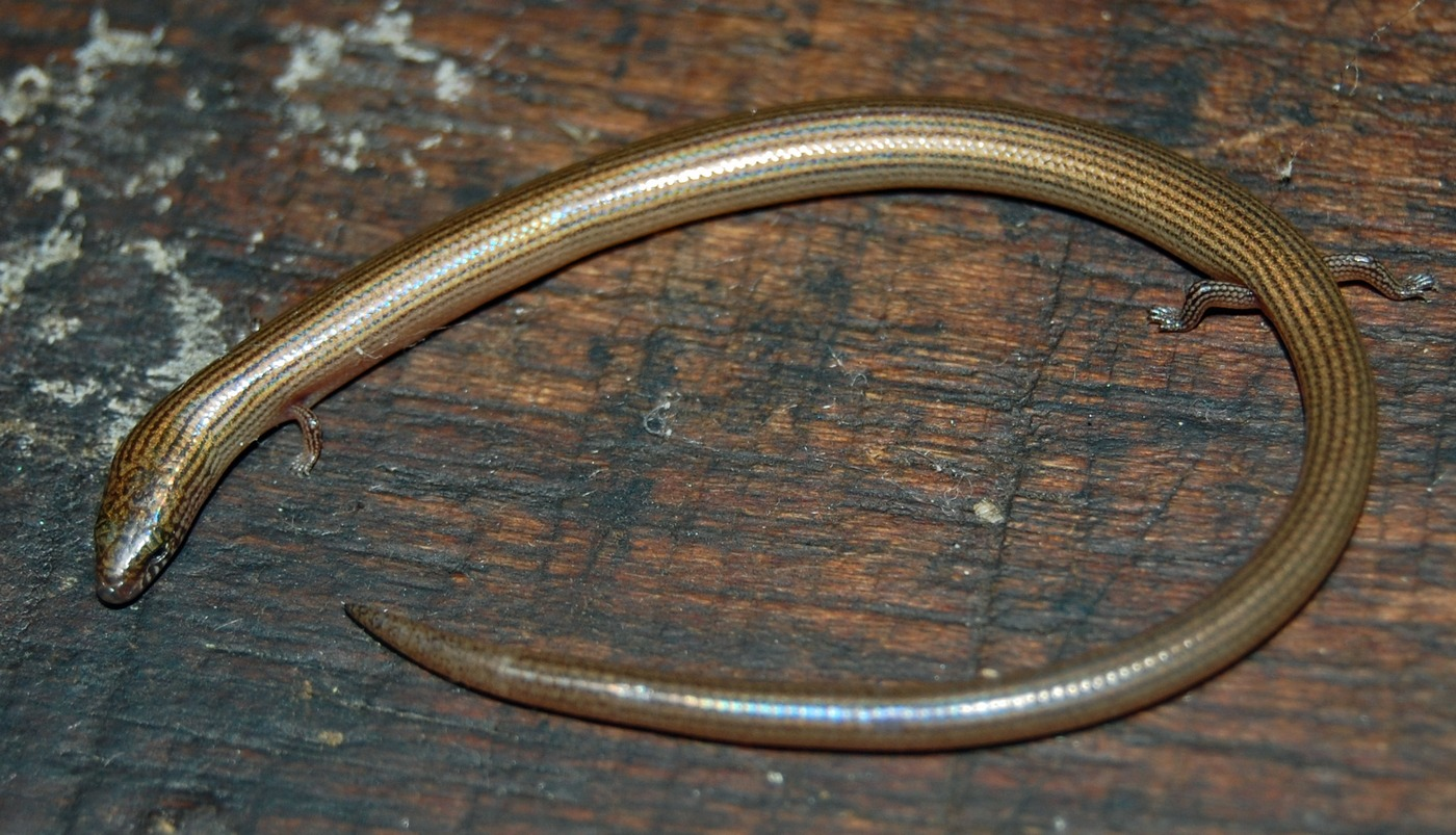 Lygosoma quadrupes. From Darmaga, Bogor, West Java, Indonesia